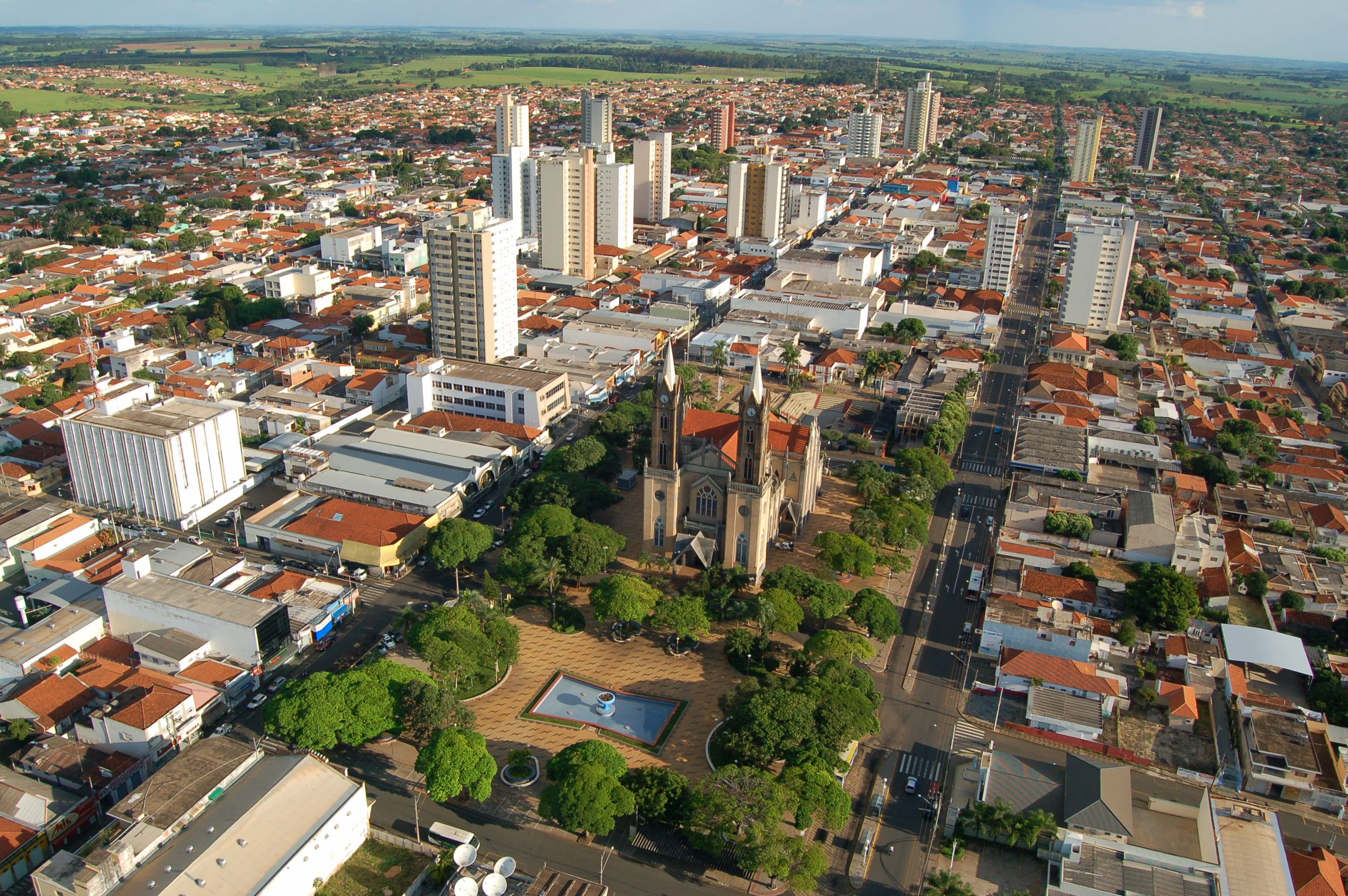 Votuporanga (SP) - Áerea - Centro da Cidade